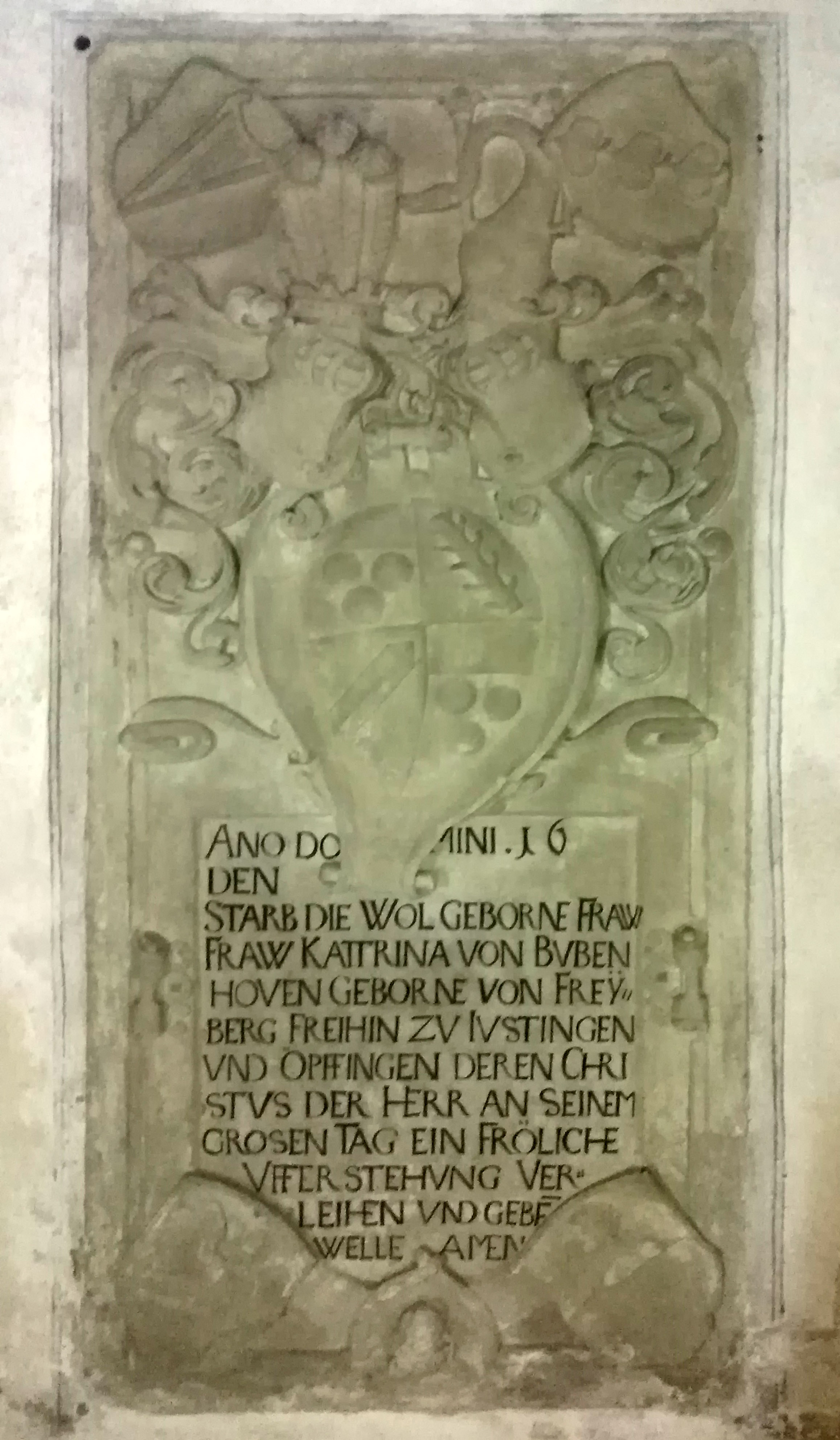 Leinstetten, Stadt Dornhan, RW - Pfarrkirche St. Stephan Epitaph der Catharina von Bubenhofen